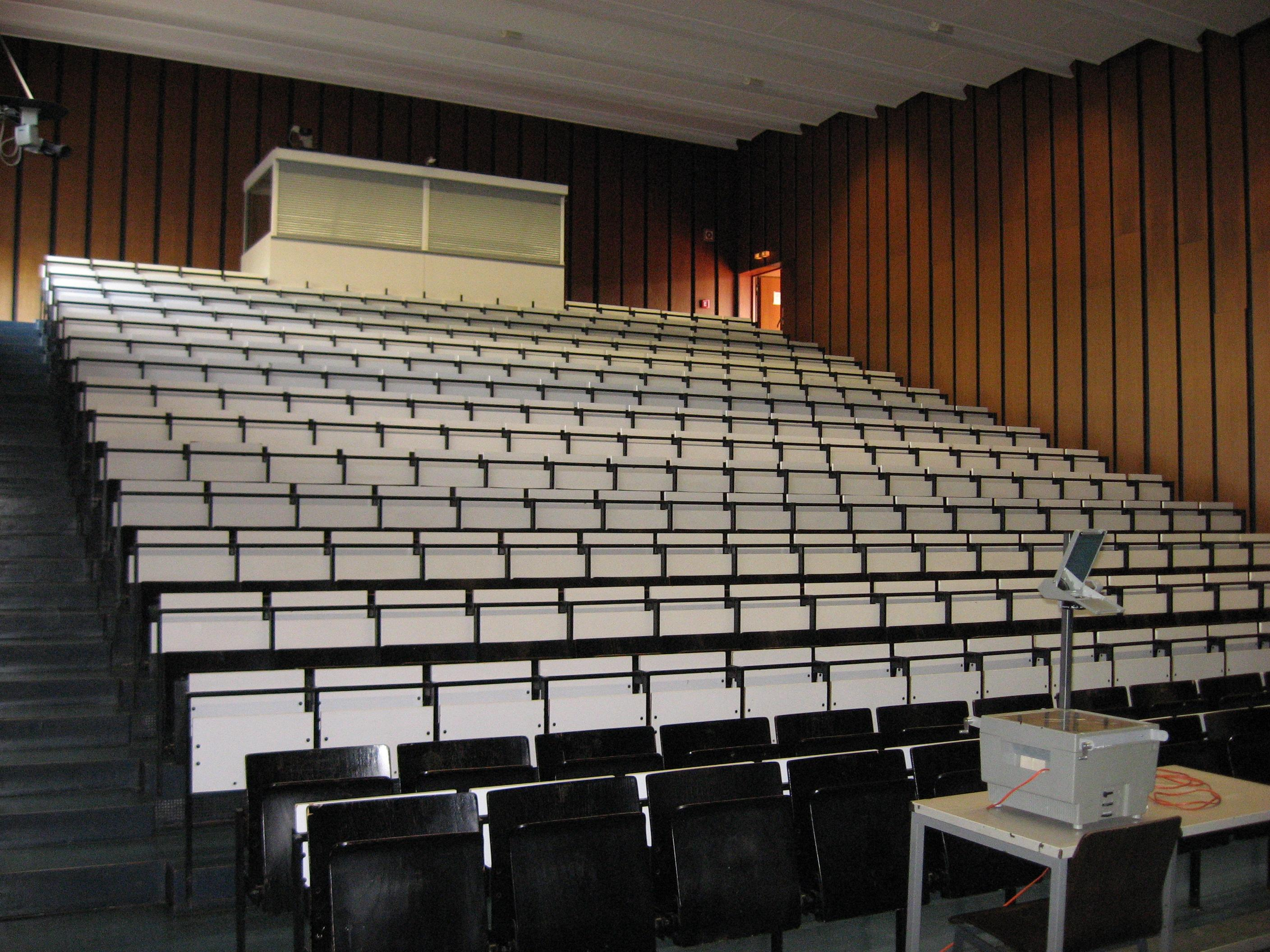 Der große Hörsaal der Architektur (L3 01 93), TU Darmstadt